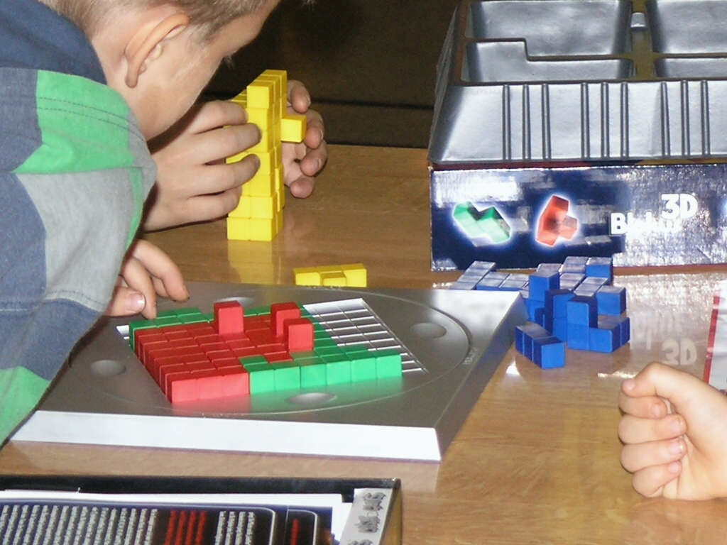 Herní festival Deskohraní 2009)